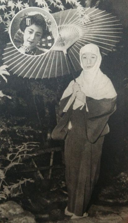 照葉